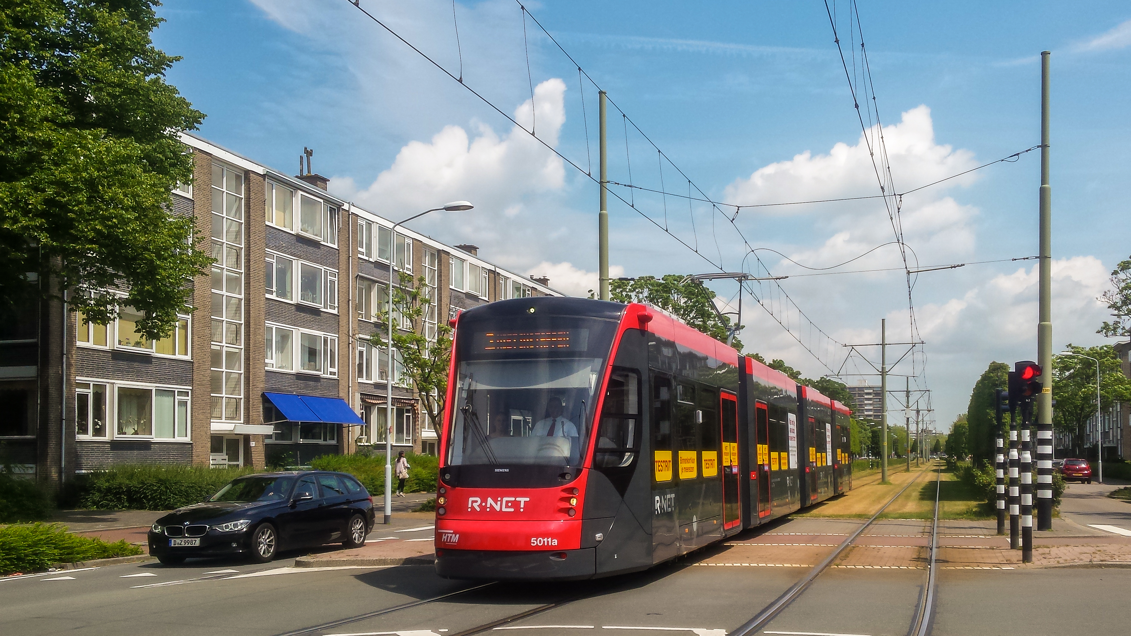 Niet heel lang geleden maakte HTM via via bekend dat de nachtelijke Avenio-testritten afgerond waren. Om de nieuwe stadstram 'in the field' te beproeven, worden er nu overdag proefritten gereden door de gewone dienstregeling heen. Op 24 juni kwam ik de 5011 tegen op zijn proefrit door Voorburg heen.